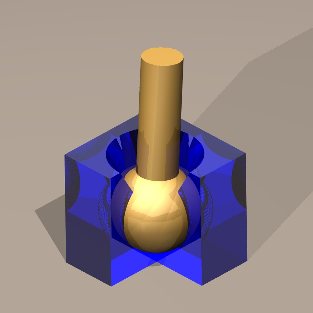 image réalisée sous SolidWorks. Cours de mécanique. Licensing Catégorie:schéma cinématique